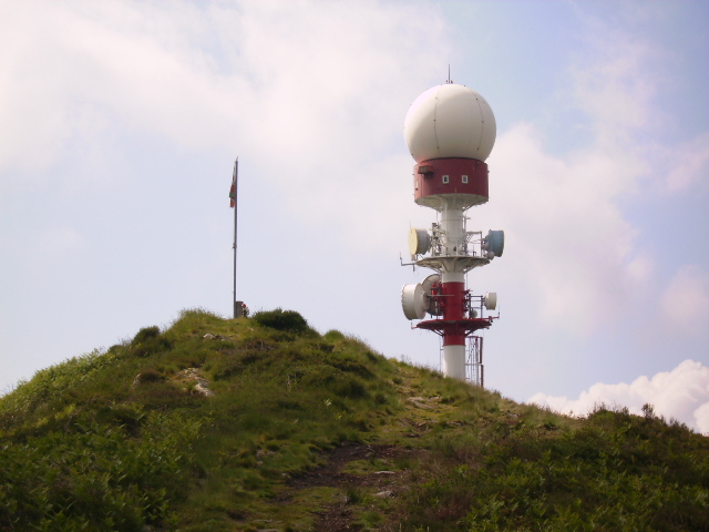 Jata gailurra eta antena